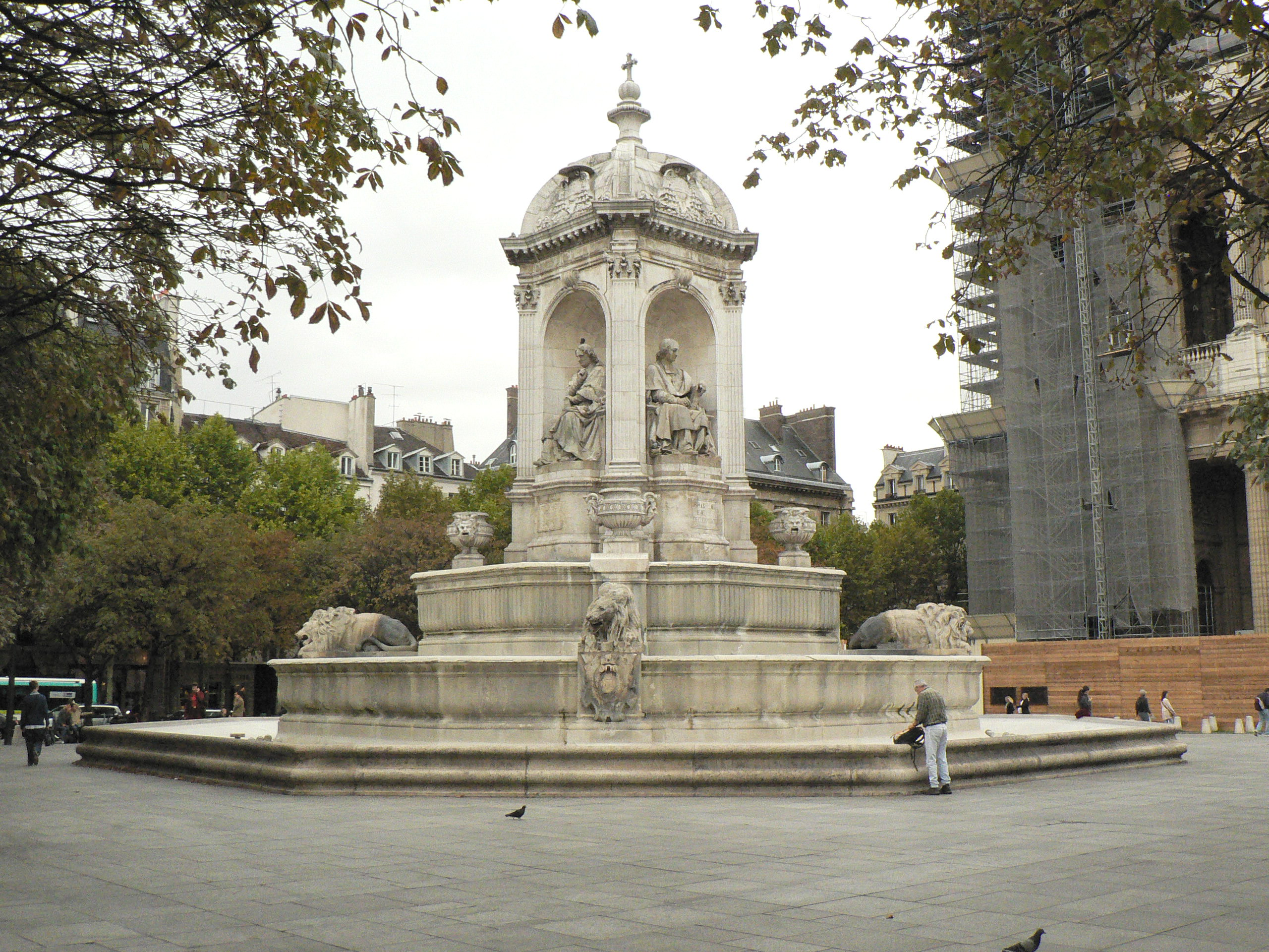 Fontaine de la place Saint-Sulpice à Paris. Statues of Esprit Fléchier (left) and Jean-Baptiste Massillon (right)